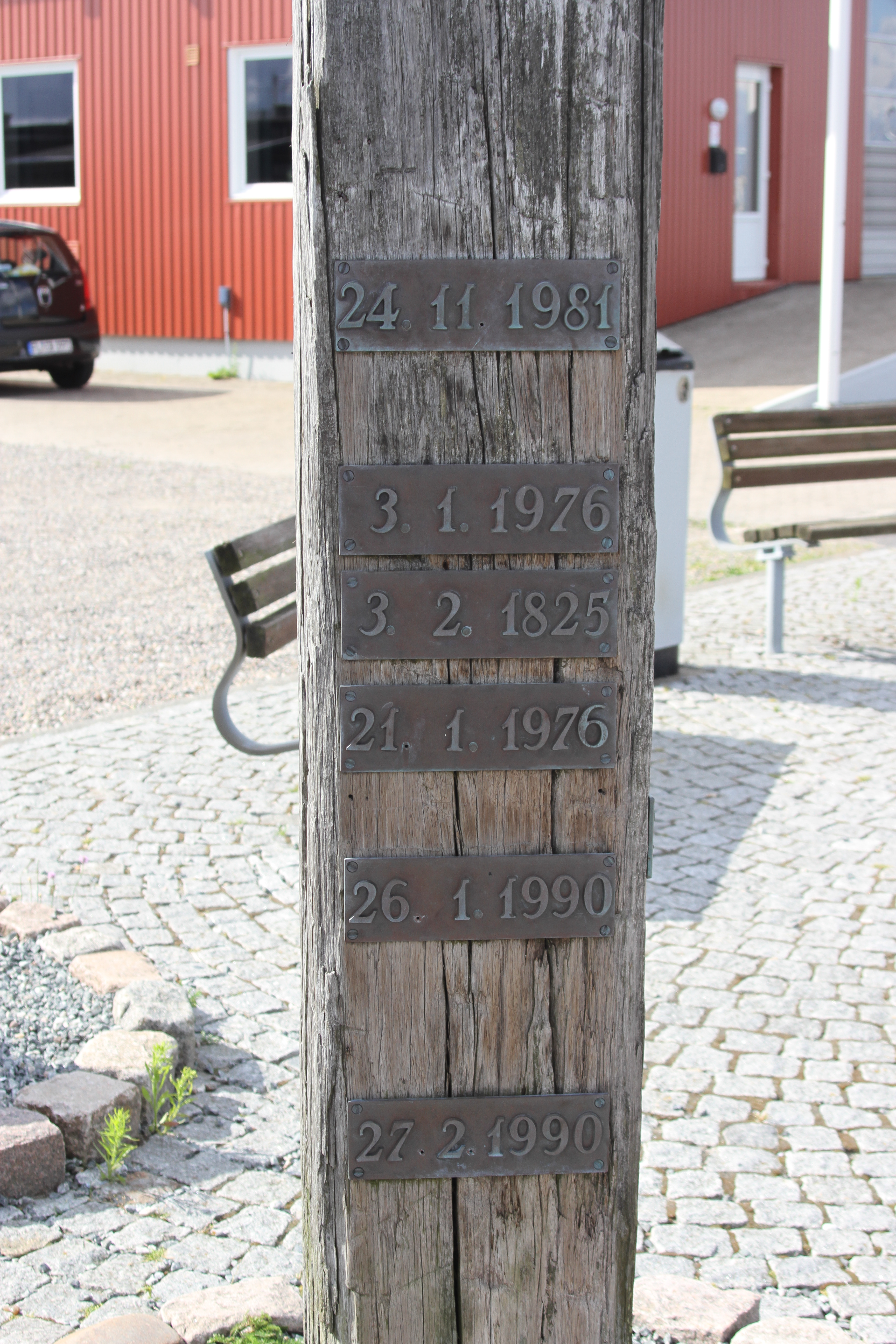 Pfahl mit Sturmflutmarken im Hafen von Havneby auf der dänischen Insel Röm.